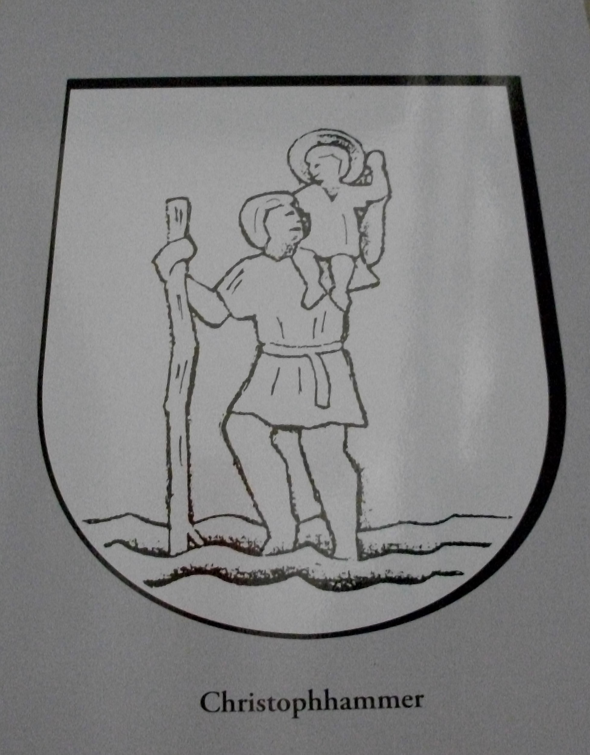 Ehemaliges Ortswappen von Christophhammer, heute Kryštofovy Hamry